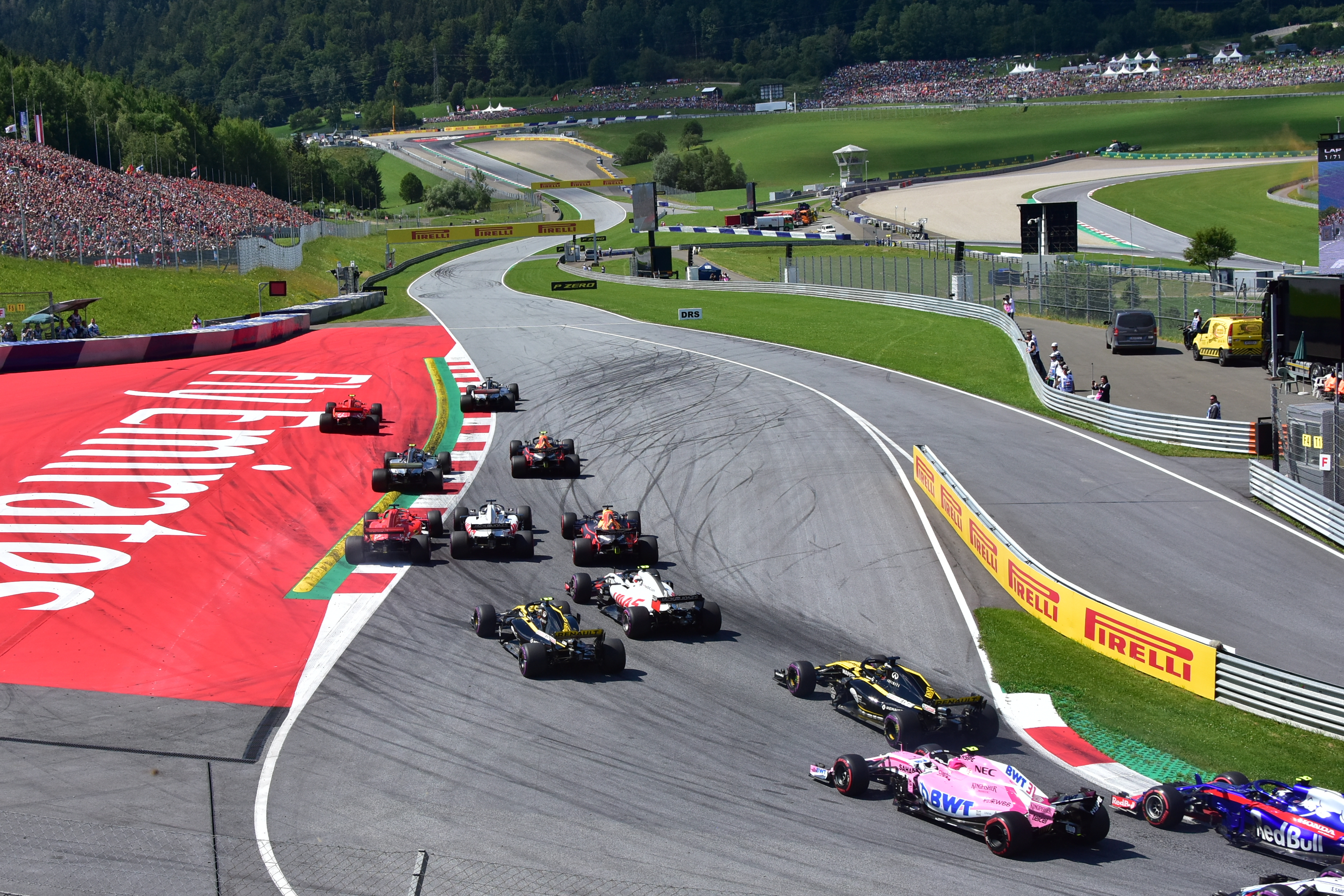 2018 Austrian Grand Prix.